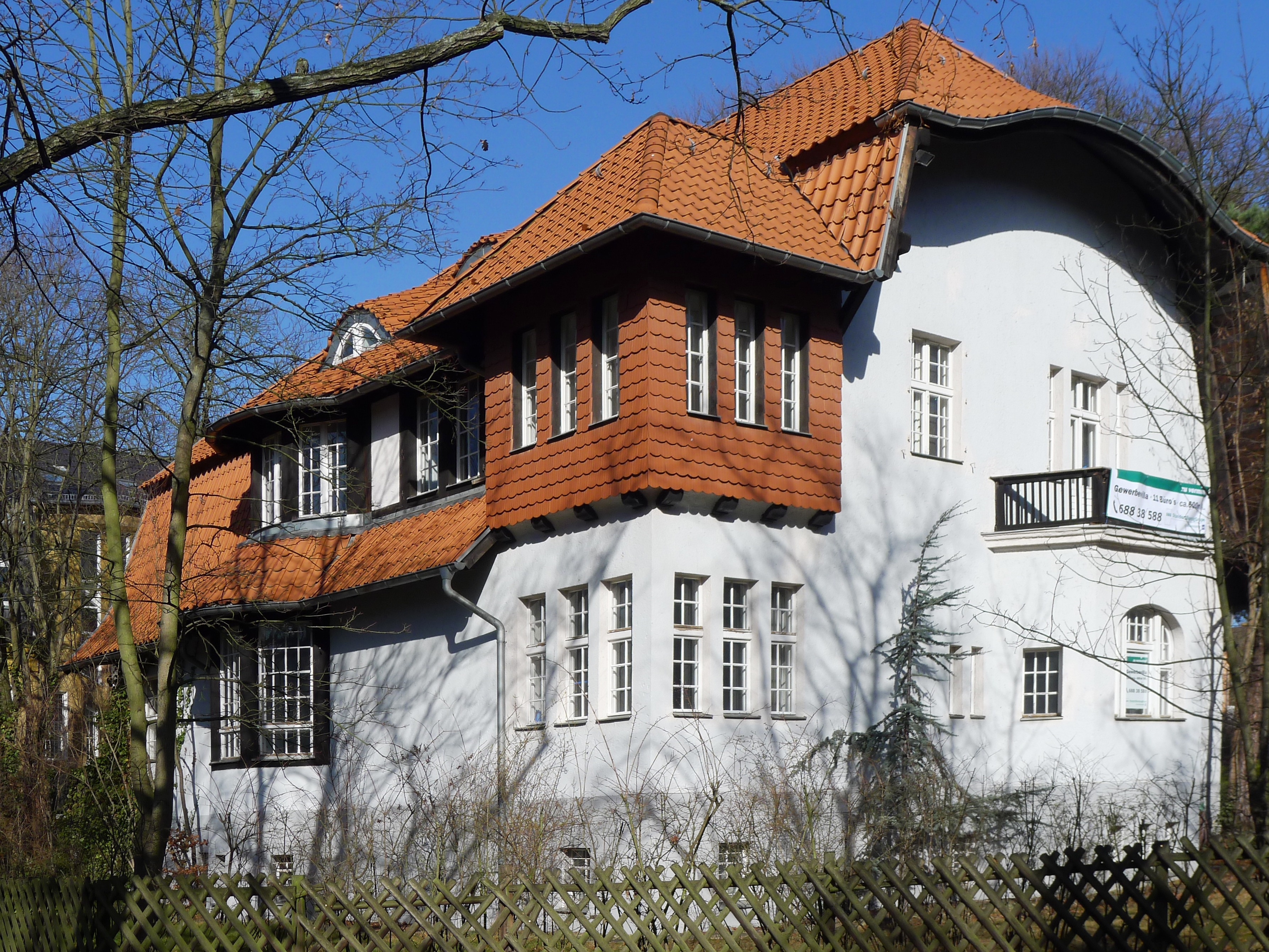 Landhaus